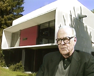 Portrait de André Wogenscky